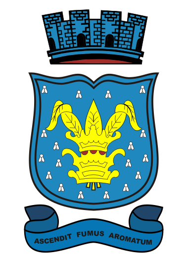 Brasão de Muritiba-BA